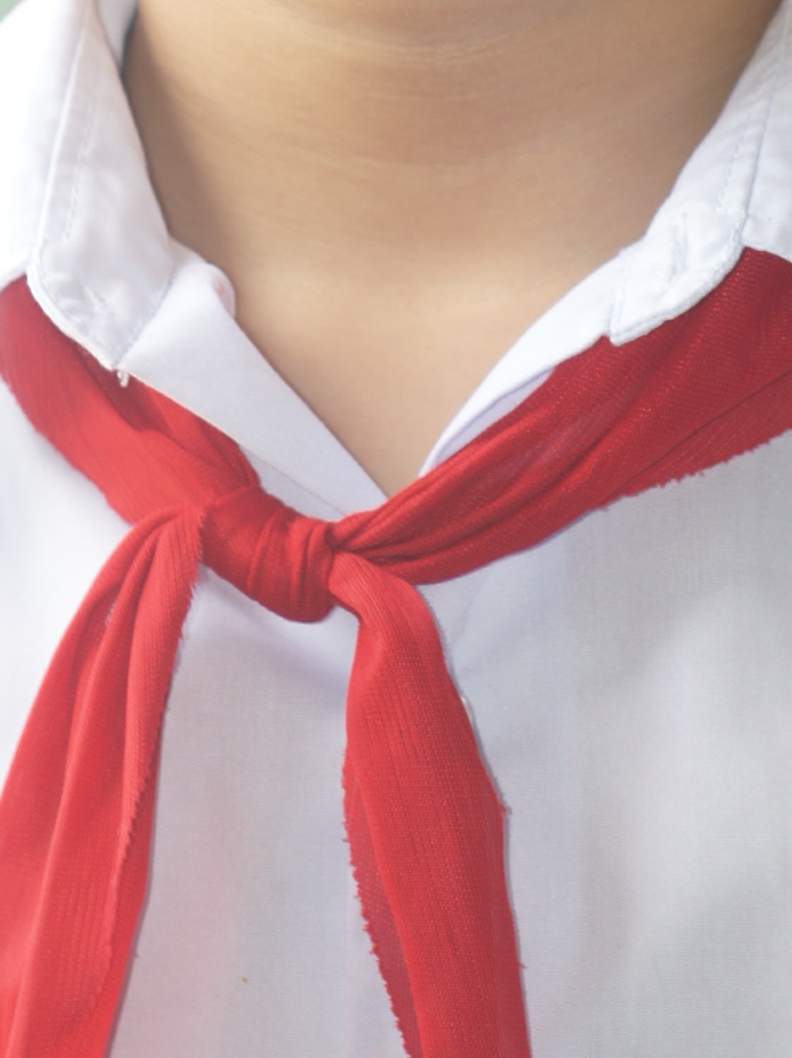 Đeo khăn quàng đỏ ở Việt Nam